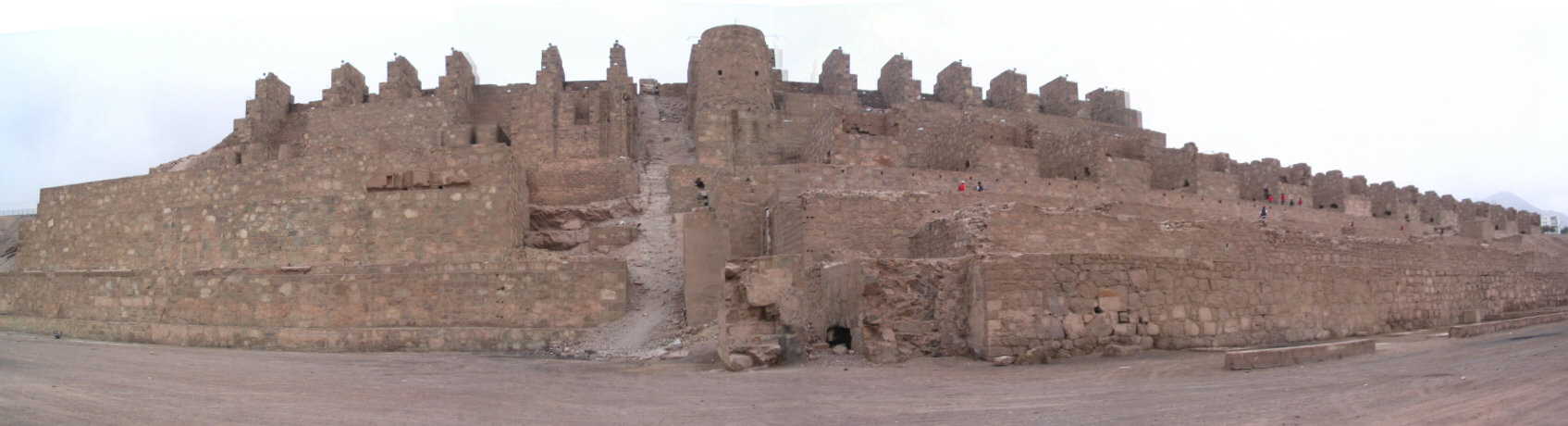 Ruinas de la Fundción de Plata Huanchaca. Antofagasta, Chile.